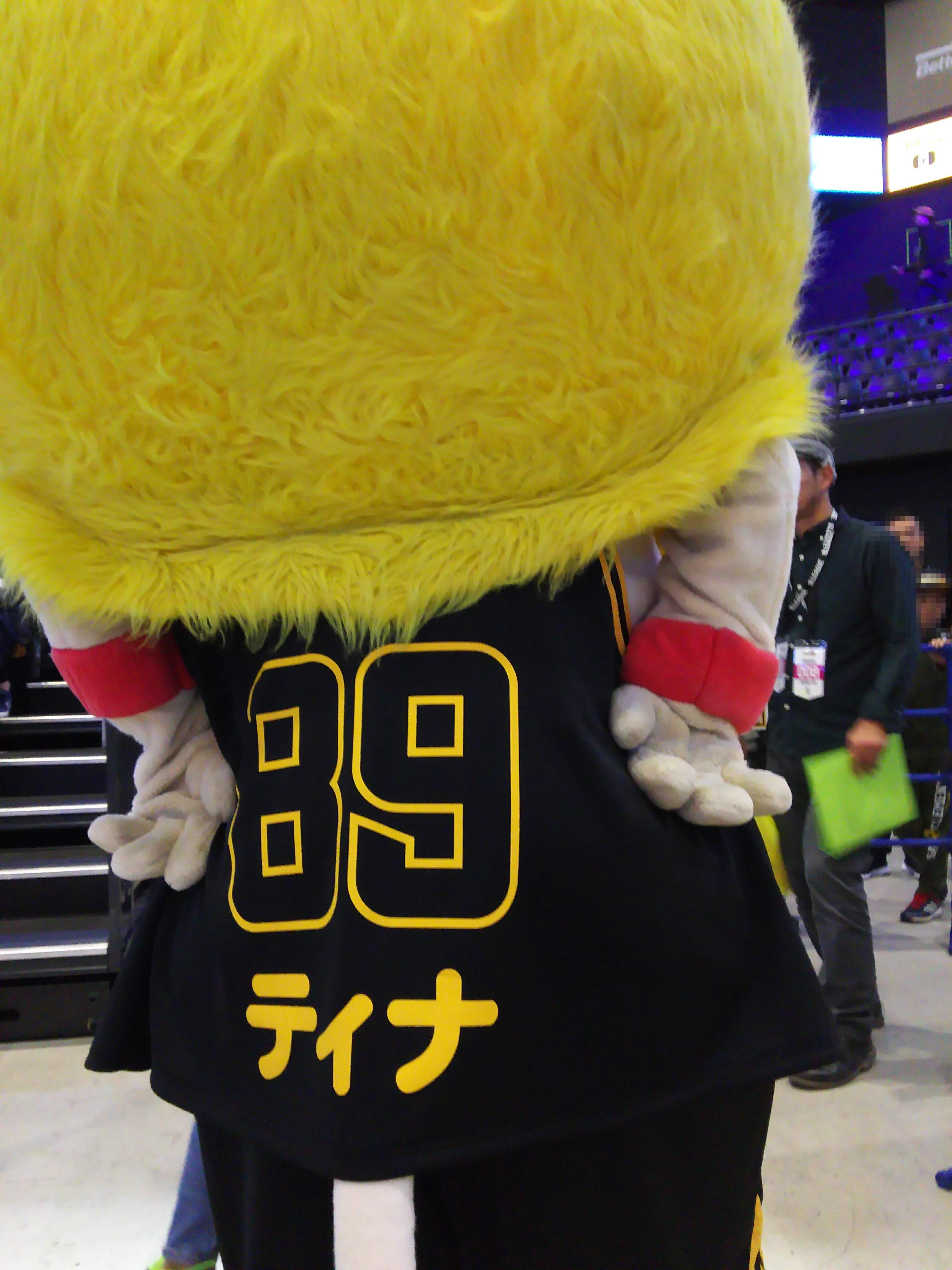 マスコットキャラクター・ティナの背番号"89" 2018年10月5日、2018-19シーズンホーム開幕節にて。